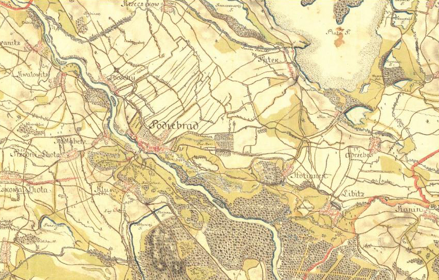 Poděbrady a jejich širší okolí - I. vojenské mapování – josefské (1764–1768, 1780–1783). Měřítko 1: 28 800